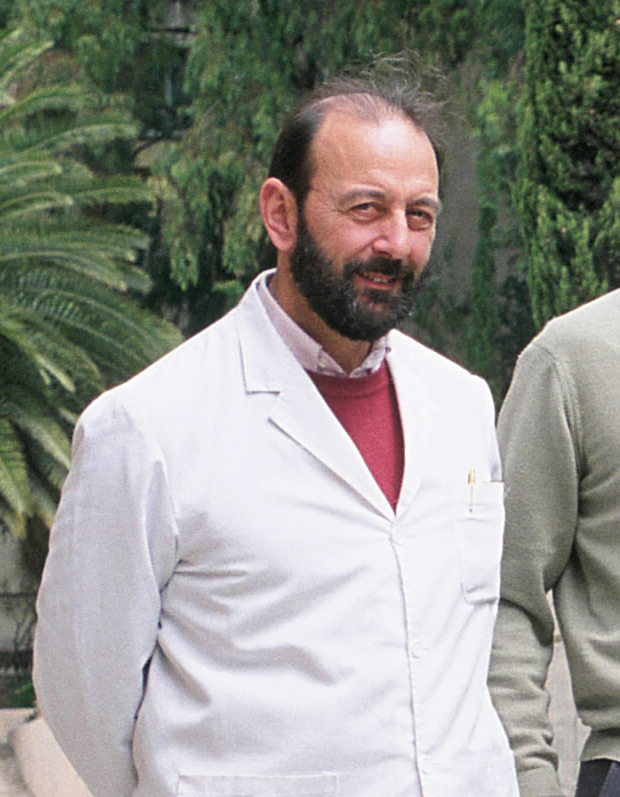 Santiago Castroviejo Bolíbar, botánico español. Fotografía hecha en el Real Jardín Botánico de Madrid, España.